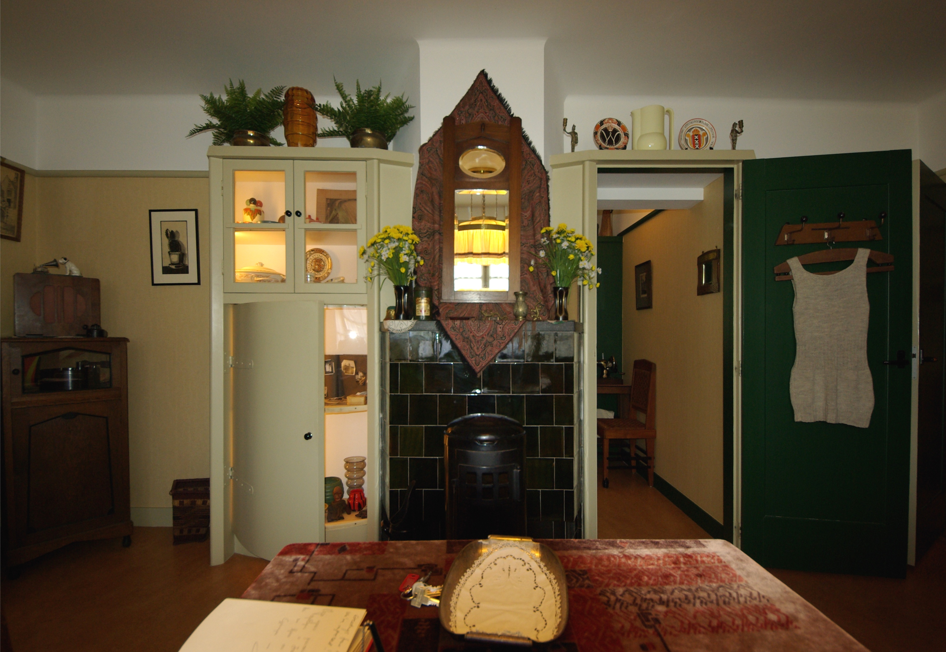 Gebouw Het Schip in Amsterdam 8″ N, 4° 52′ 27.06″ E